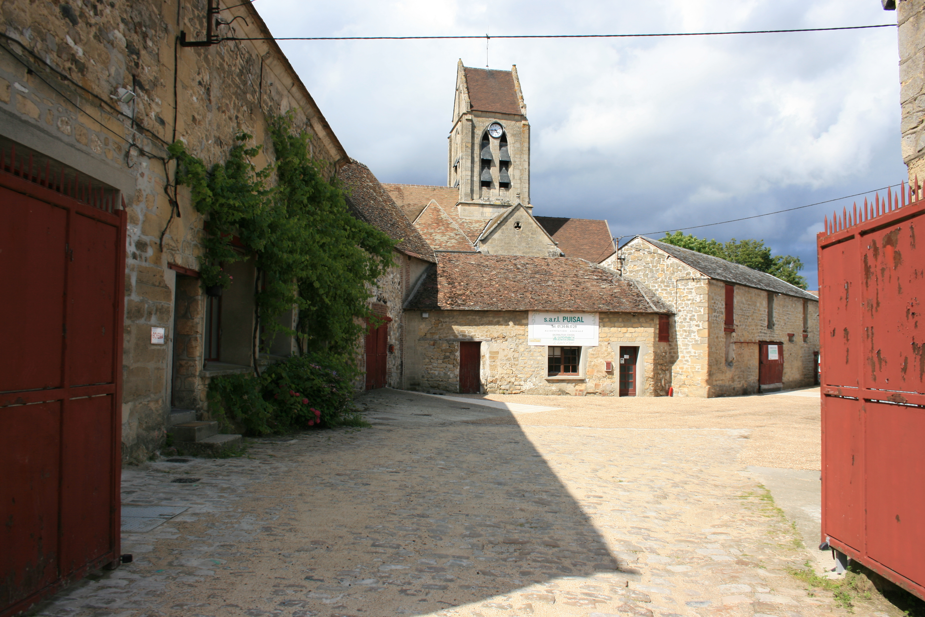 Puiseux-Pontoise Entrée de la zone d'activité de la cour de l'église